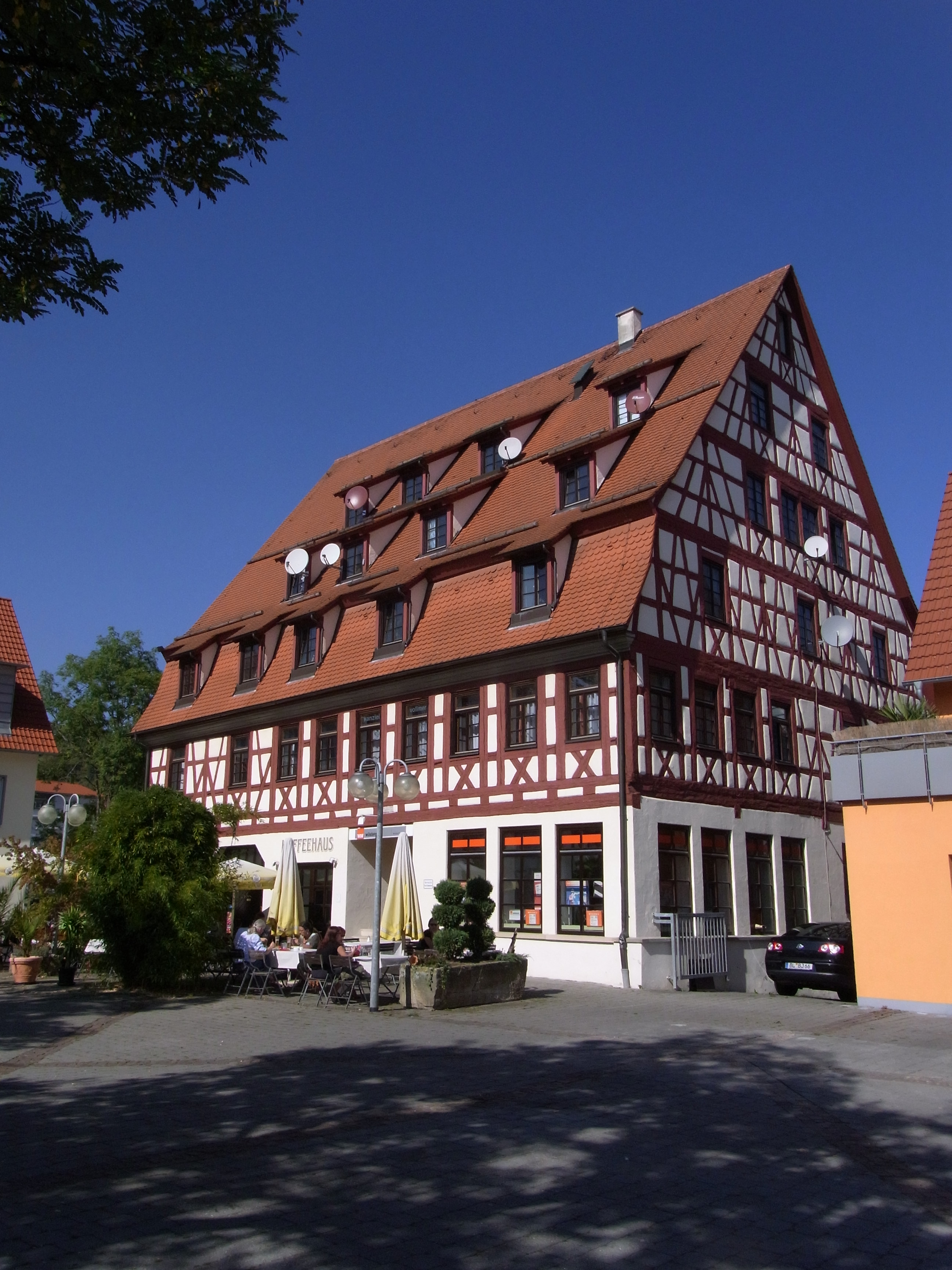 Balingen: Viehmarktplatz-Gasthof Sonne